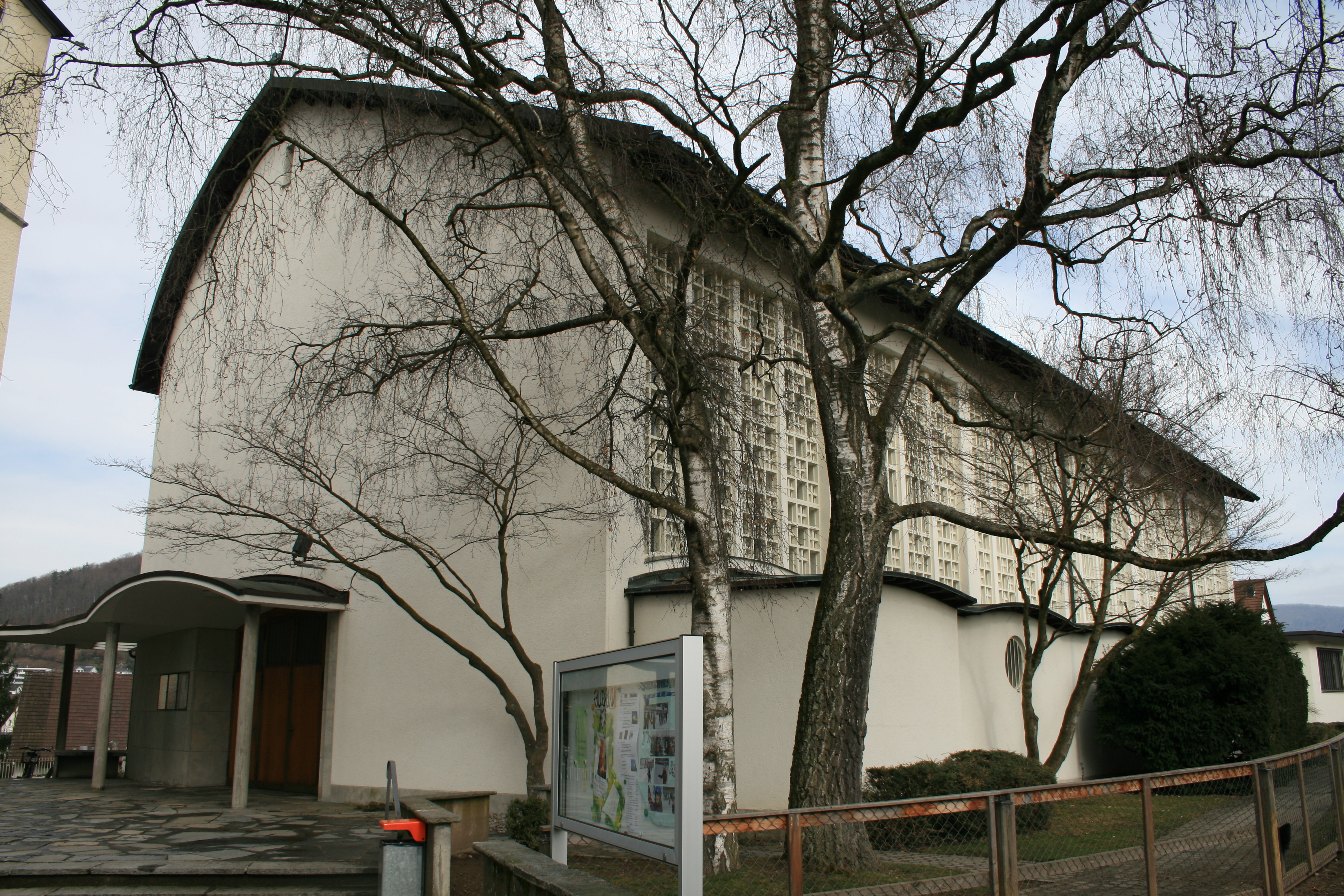 Würenlos